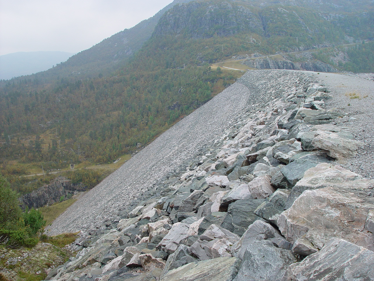 Vatnedalsdammen i Bykle